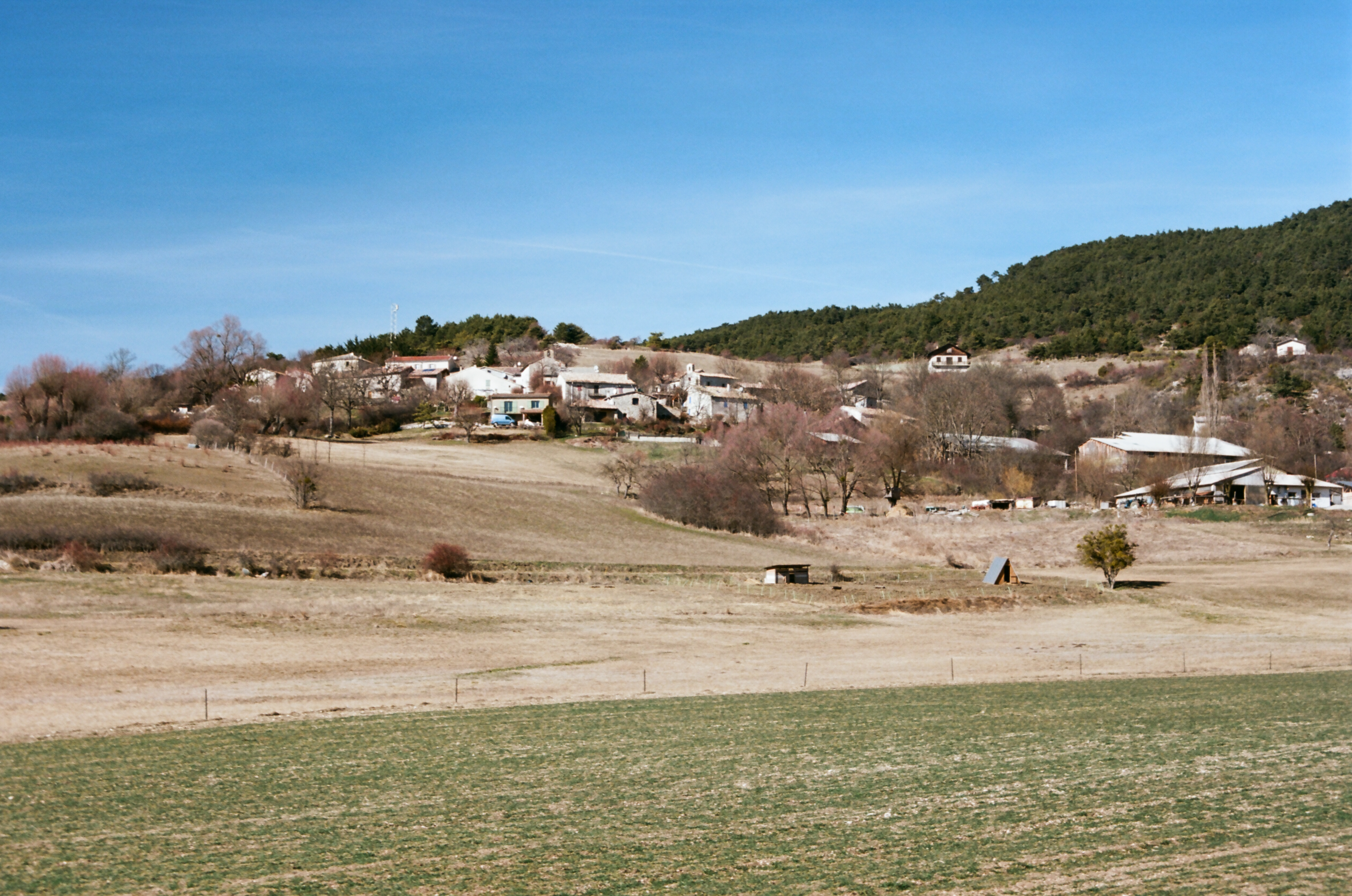 Vue du village